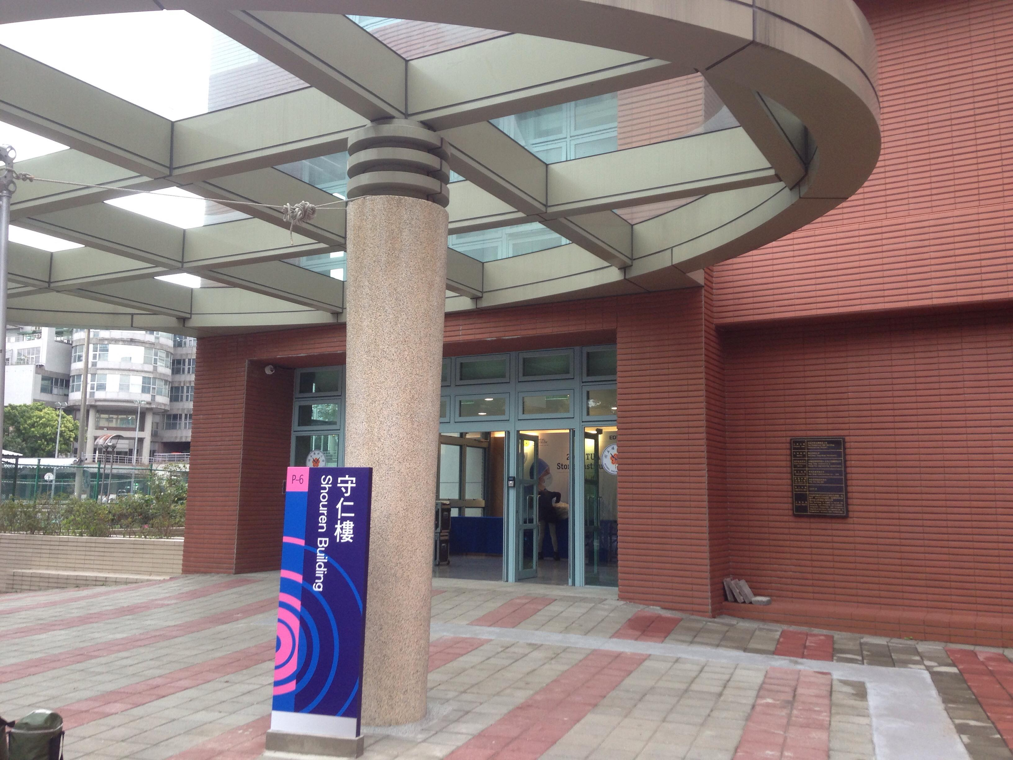 國立陽明大學守仁樓